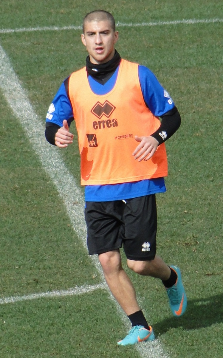 Giuseppe De Luca, calciatore italiano